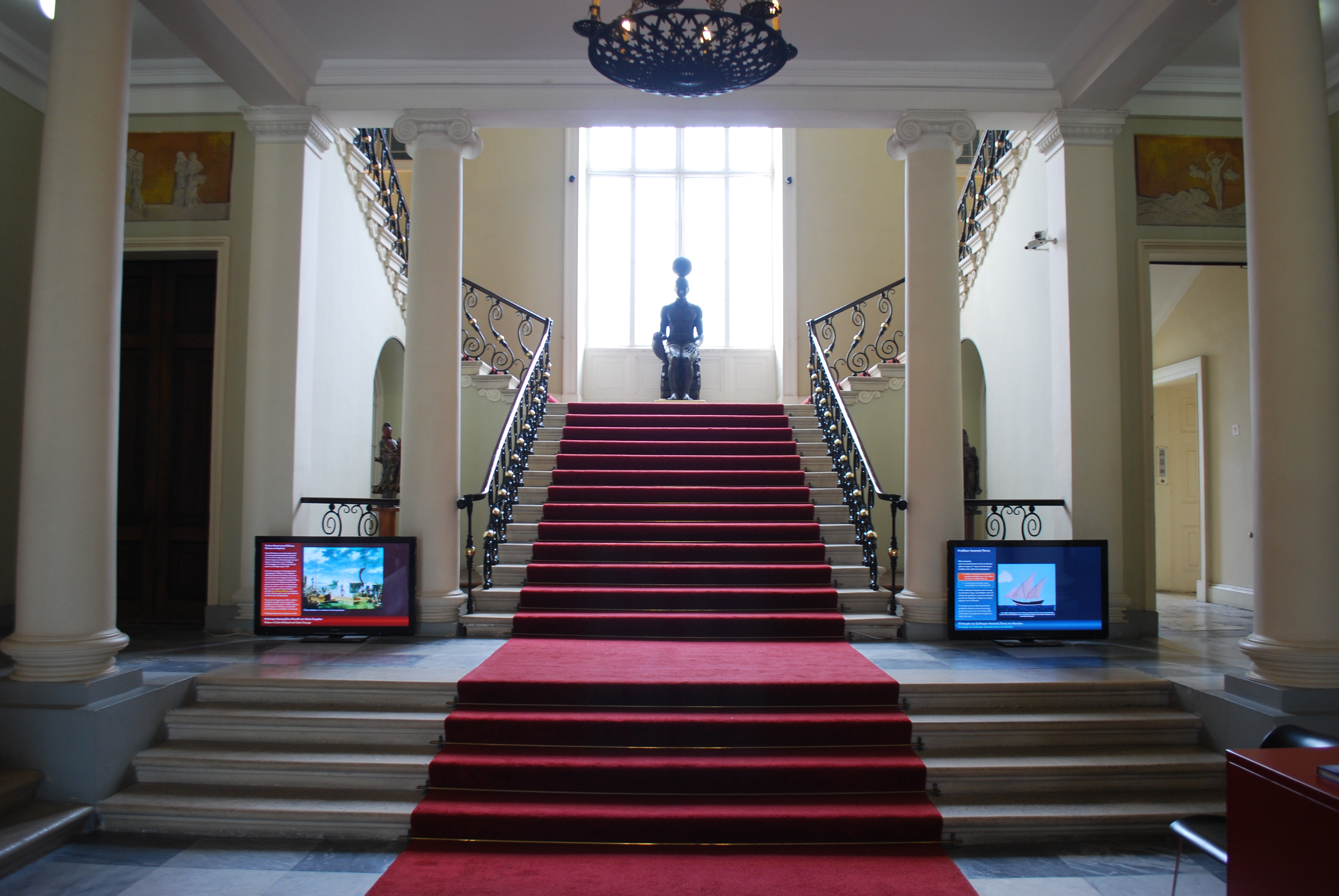 Vue de l'intérieur des Anciens Palais de Corfou.